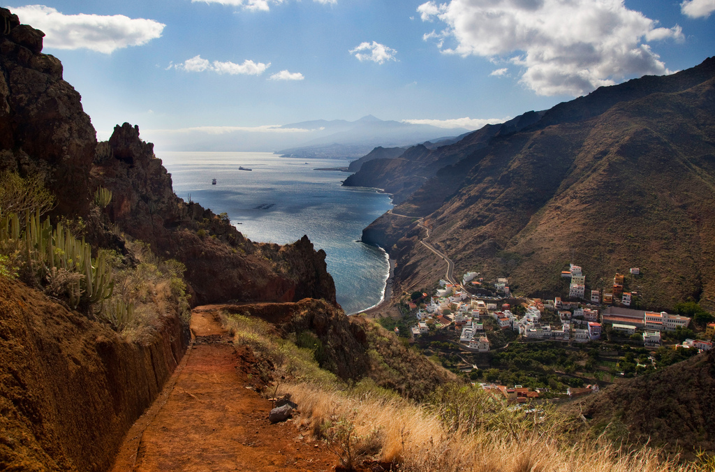 Vista de Igueste de San Andrés desde el camino que conduce al Semáforo de Anaga. Al fondo se puede ver Santa Cruz e incluso El Teide.